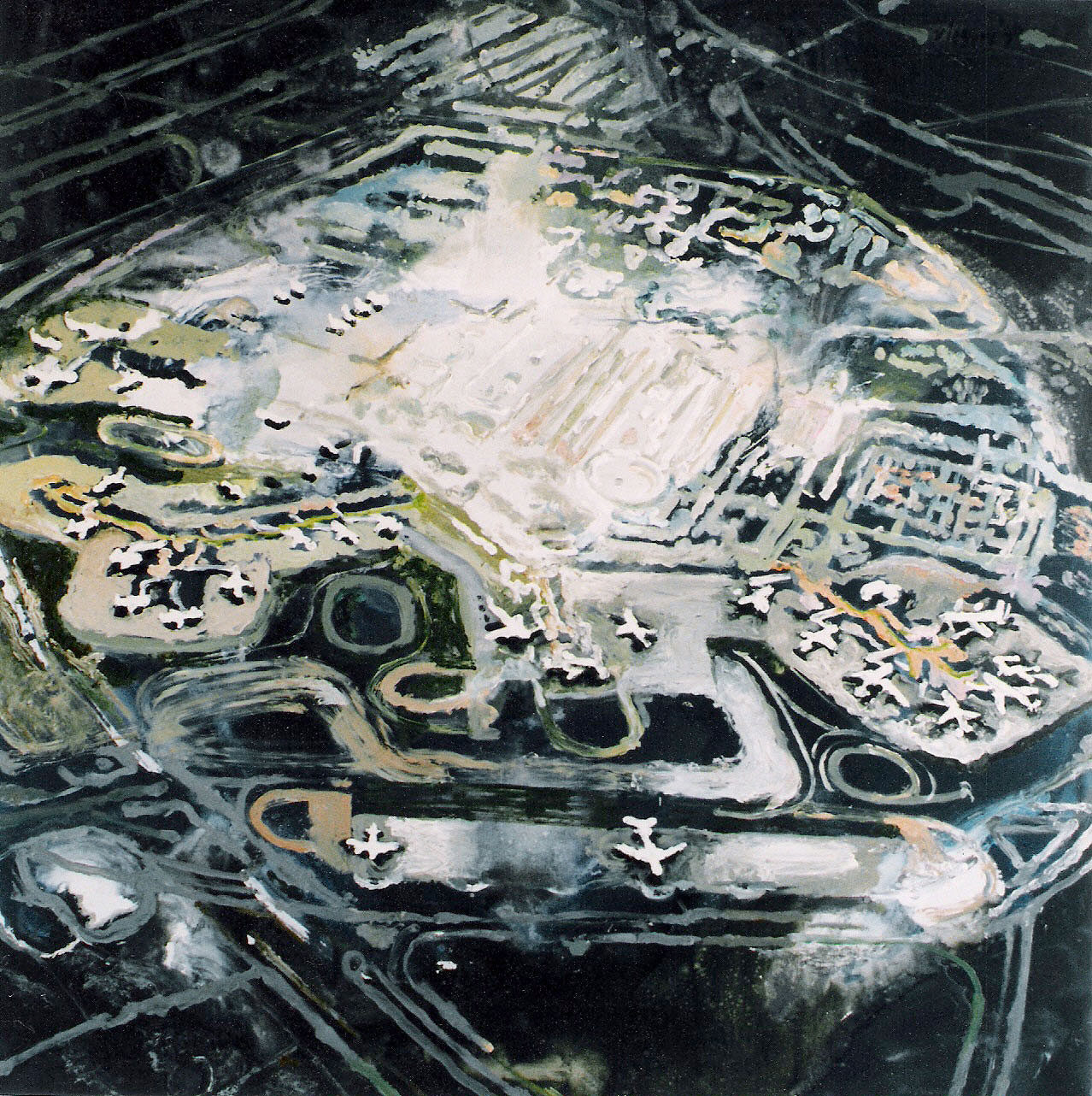 Schilderij van Janneke Viegers, Schiphol. Collectie: Amsterdams Historisch Museum, Acquisitie Schiphol (Schiphol Airport) 1996. olieverf op linnen, 2x2 meter.